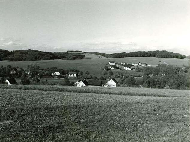 Teilansicht von Grötzenberg 1975 - Gemeinde Nümbrecht